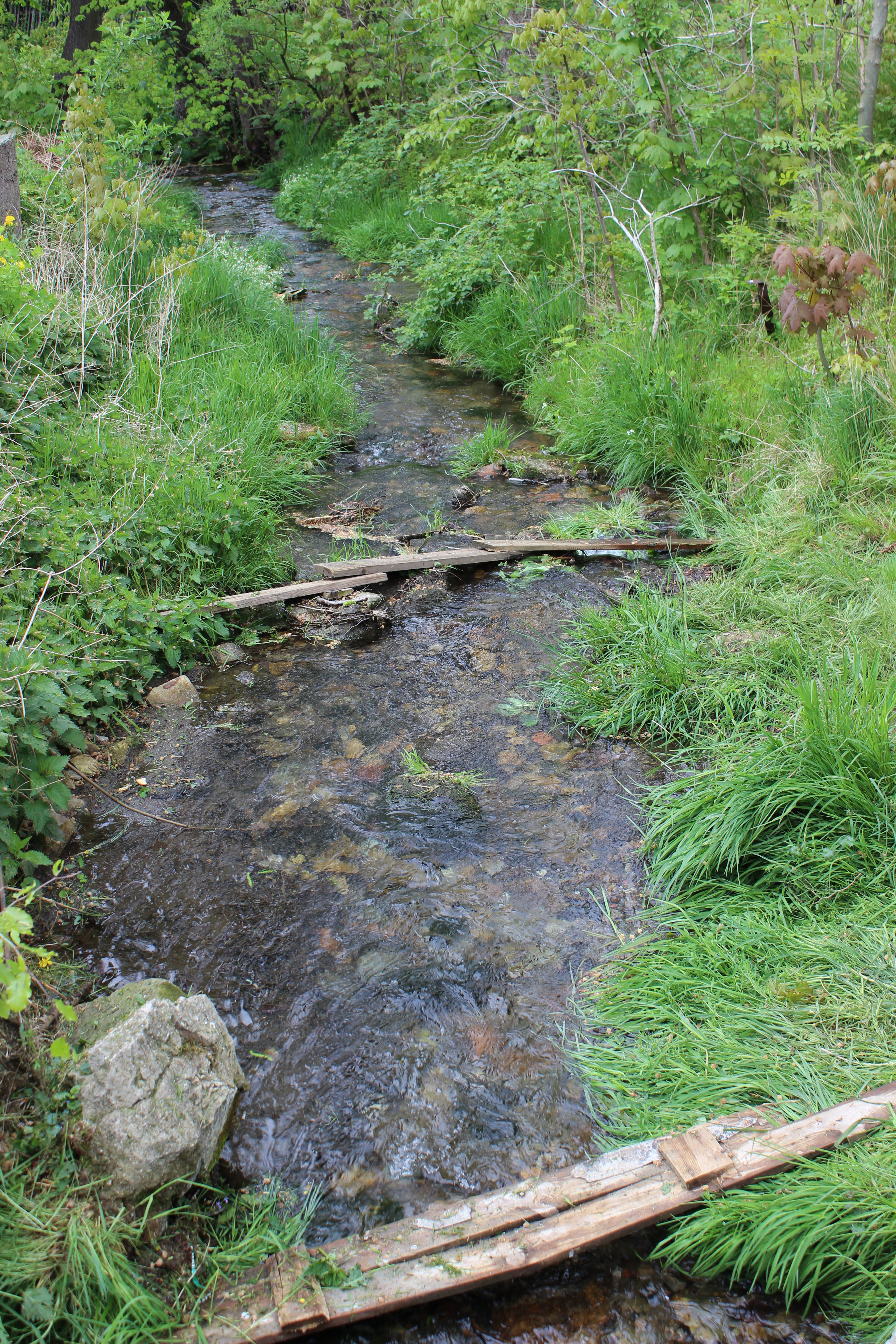 Ludvíkovský potok v Ludvíkově pod Smrkem.